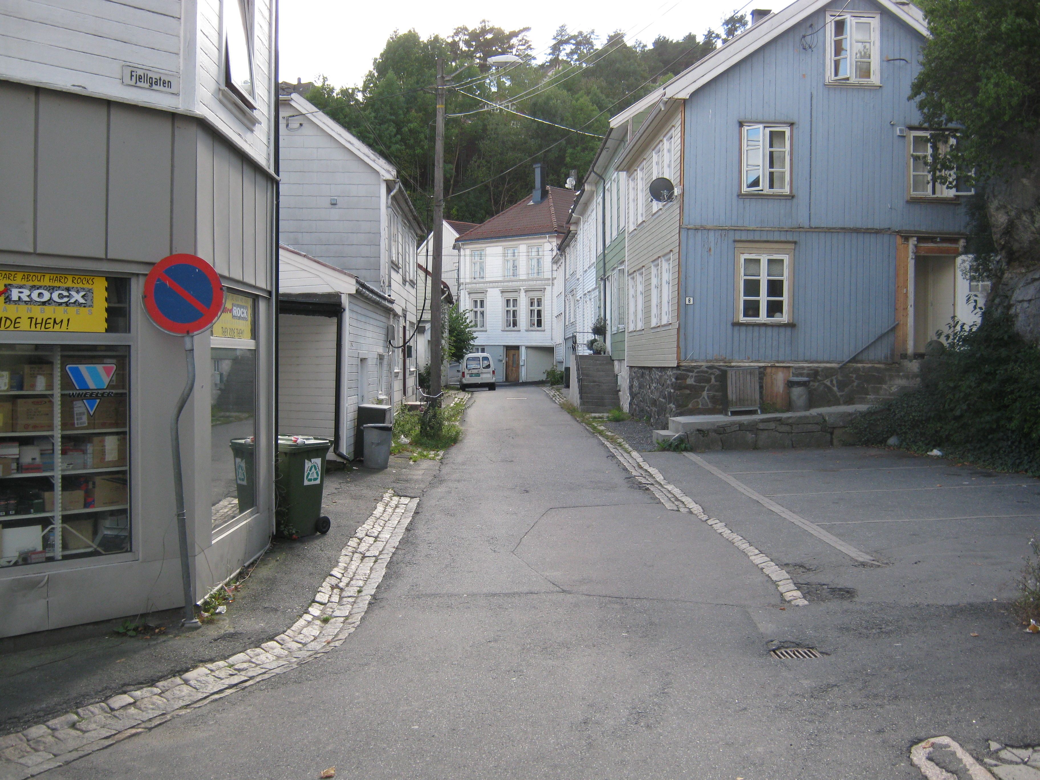 Fjellgaten i Arendal